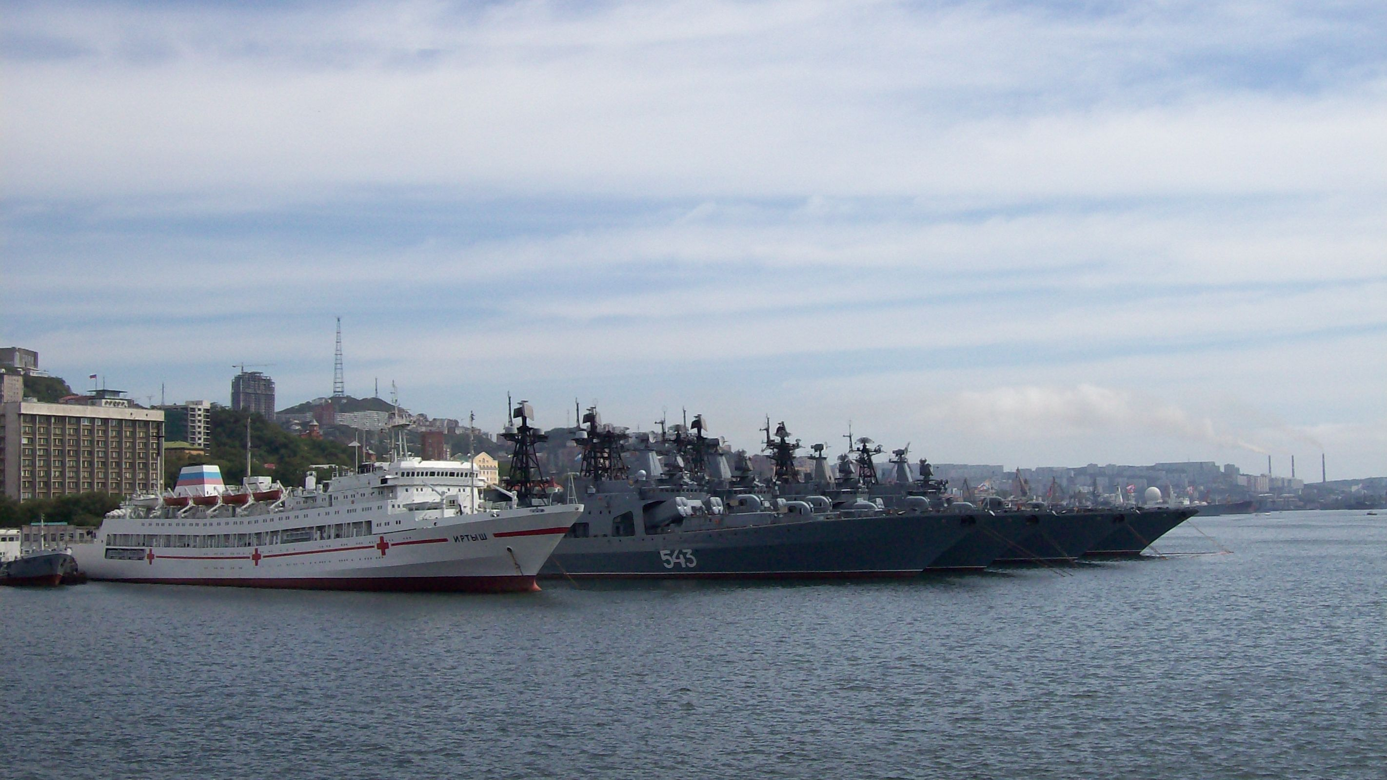 Госпитальное судно "Иртыш" во Владивостоке